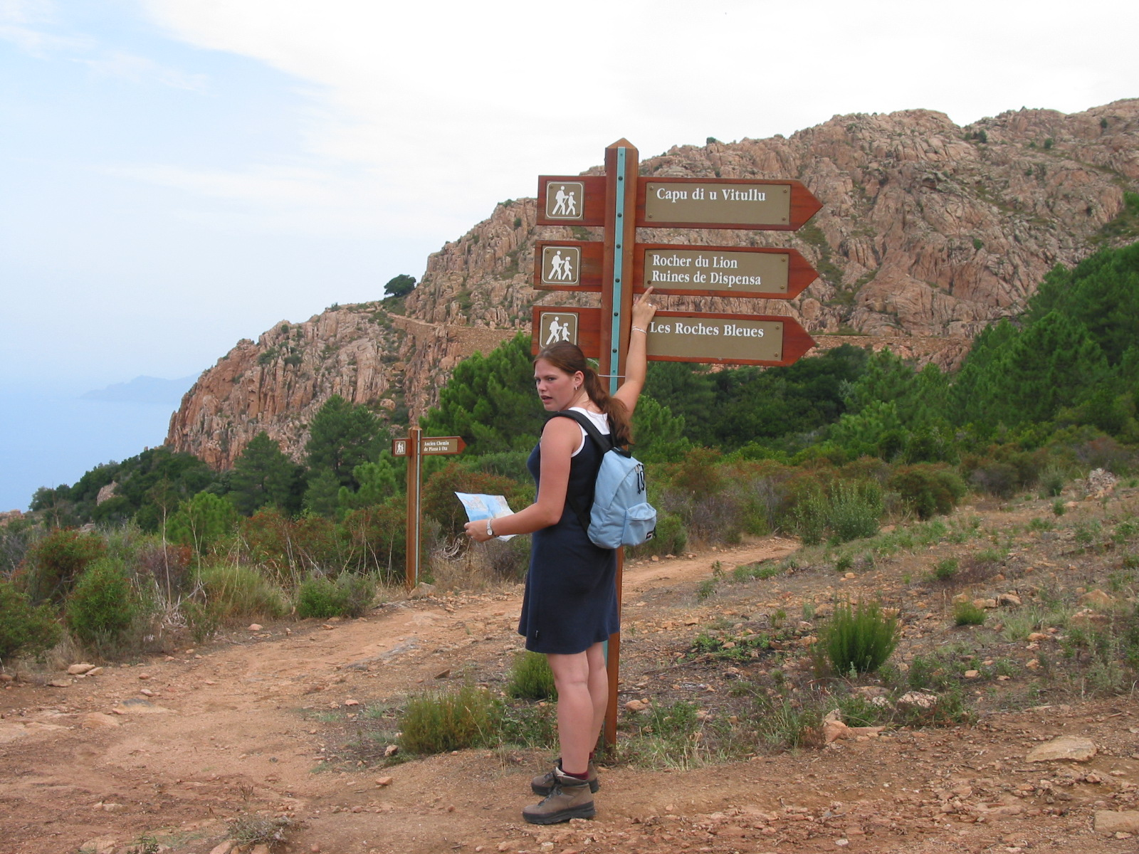 Rocher du Lion - Panneaux (chemins de randonnée) - (Haute-Corse, France)